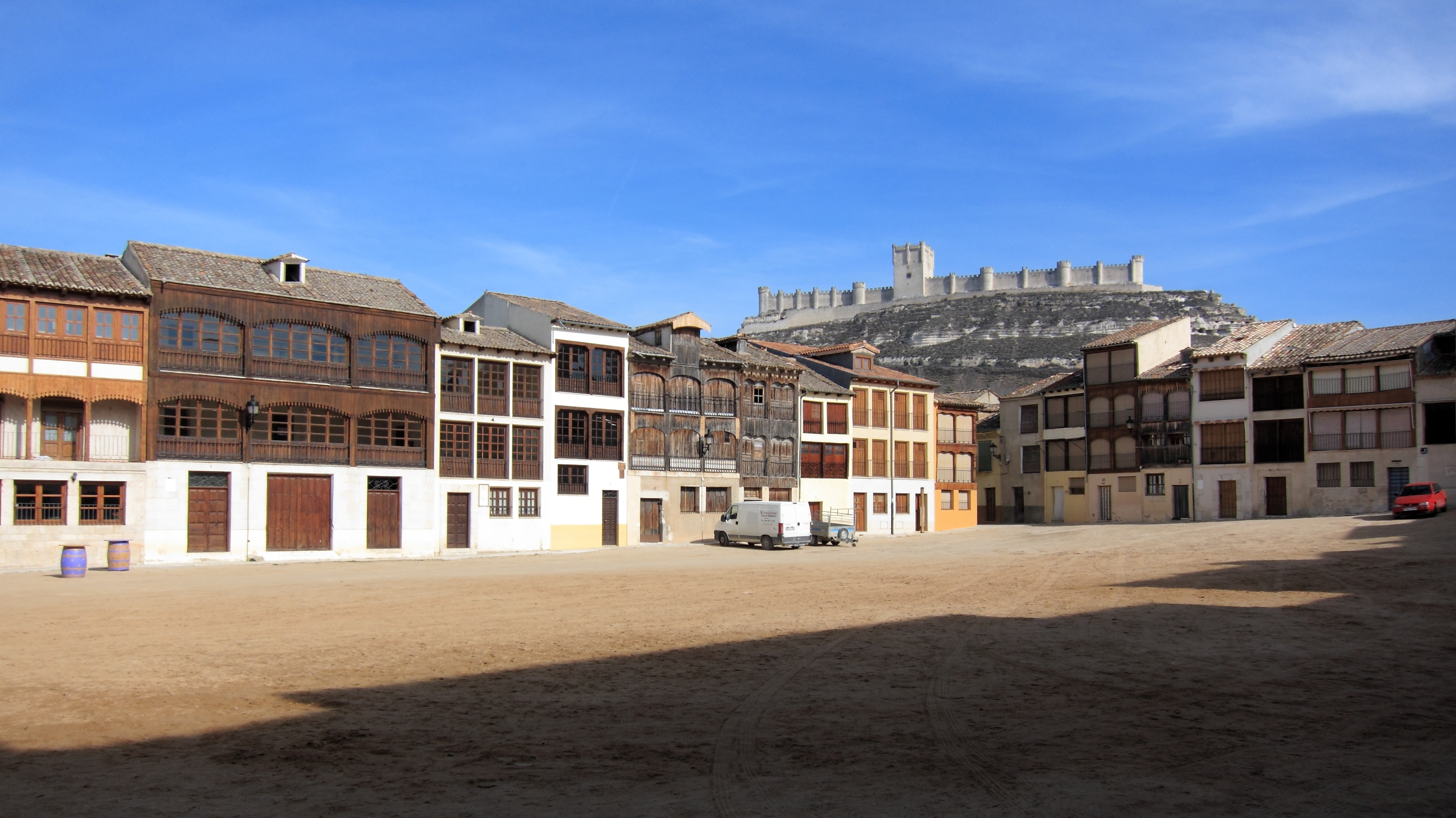 Plaza del Coso, Peñafiel (Valladolid), España. Al fondo se observa el castillo de Peñafiel.